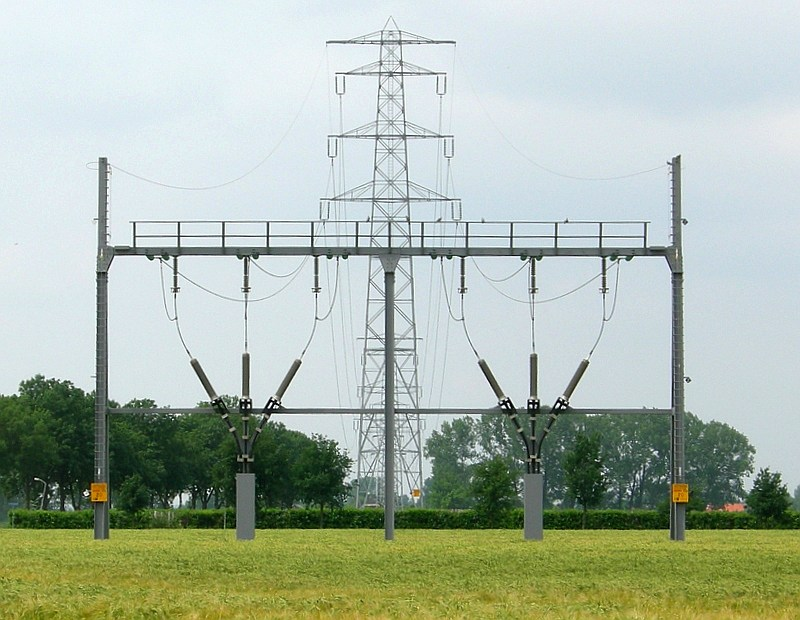 Overgang van boven- naar ondergronds (150 kV) energietransport nabij Eimeren